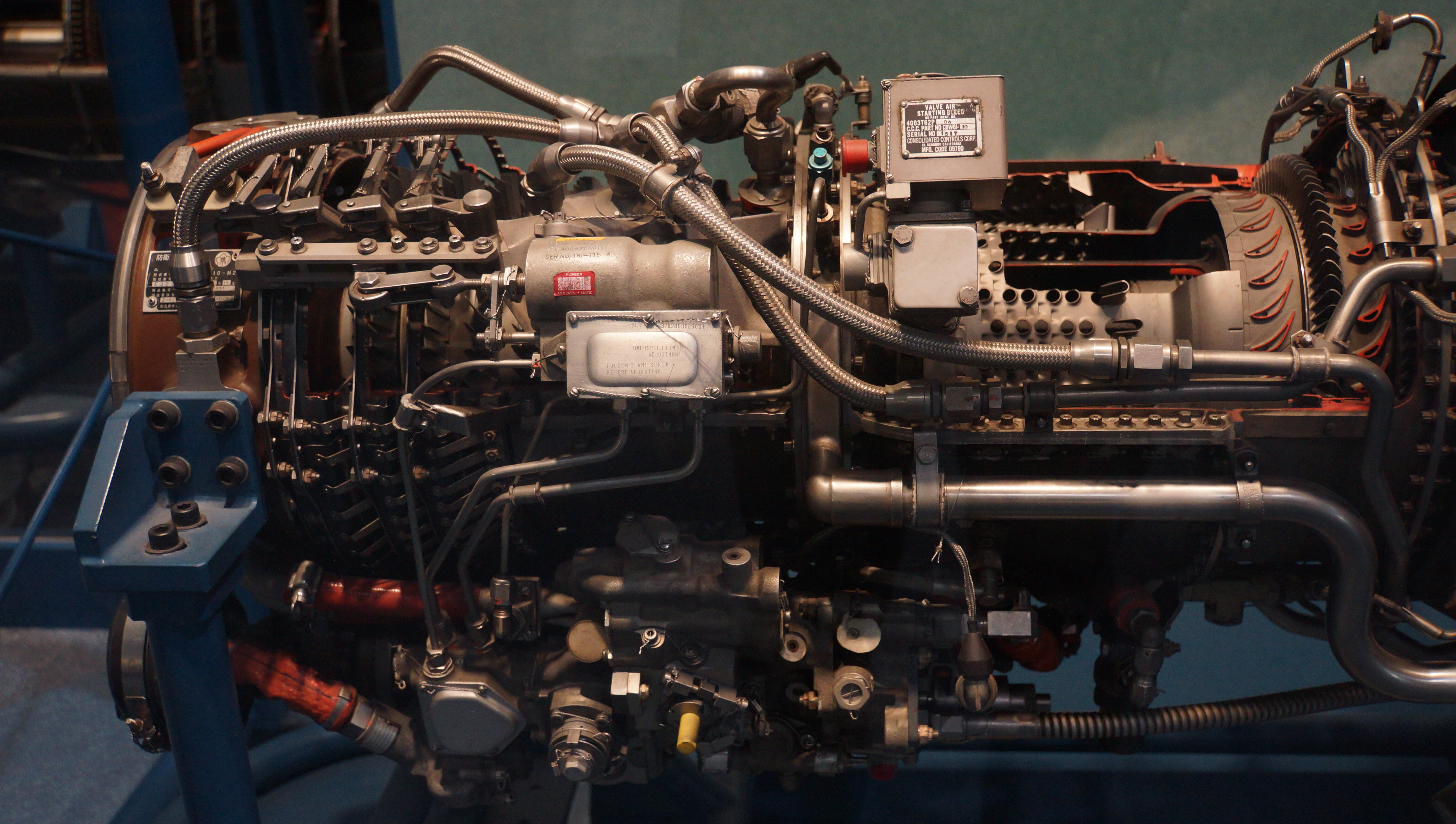 T58-IHI-10M2ターボシャフト・エンジン（カットモデル） 圧縮機及び燃焼室 左側面。2014年11月2日 かかみがはら航空宇宙科学博物館内にて。